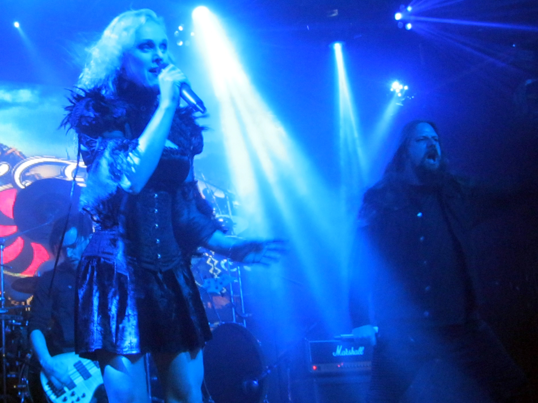 Leaves' Eyes In Israel, 2016